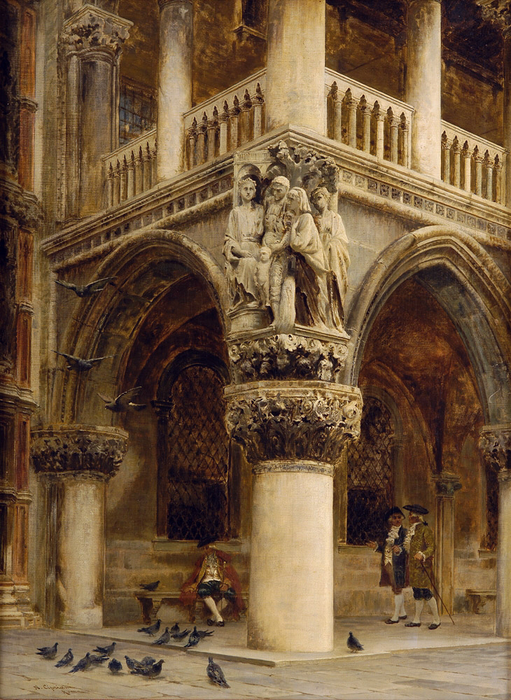 Der Dogenpalast zu Venedig. Signiert. Öl auf Leinwand, 84 x 62,5 cm